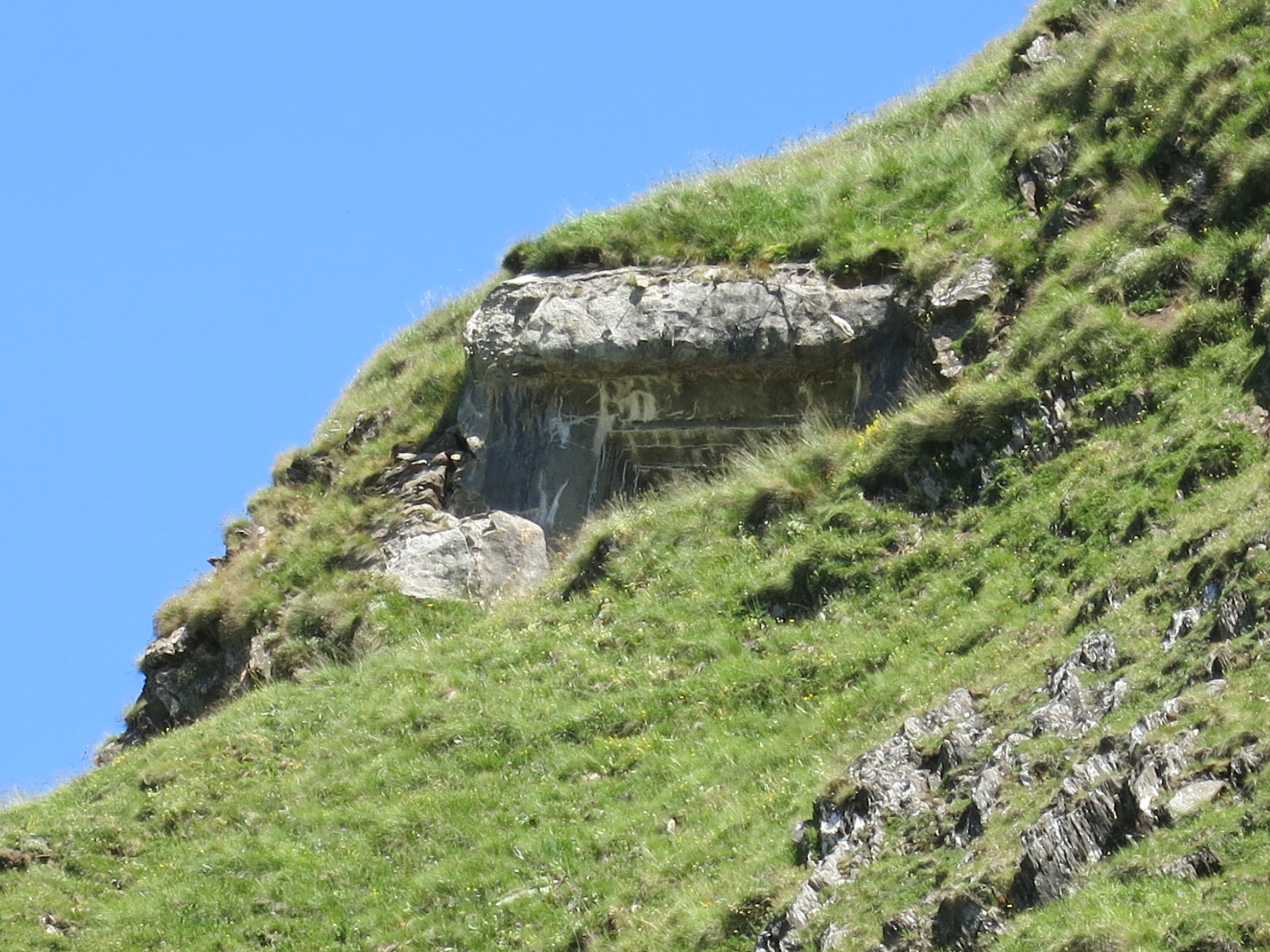 Artilleriewerk Grandinagia, Bedretto TI, Schweiz